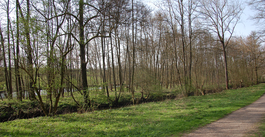 Blick über den Flößerkanal und die Enz auf die Remminger Flur